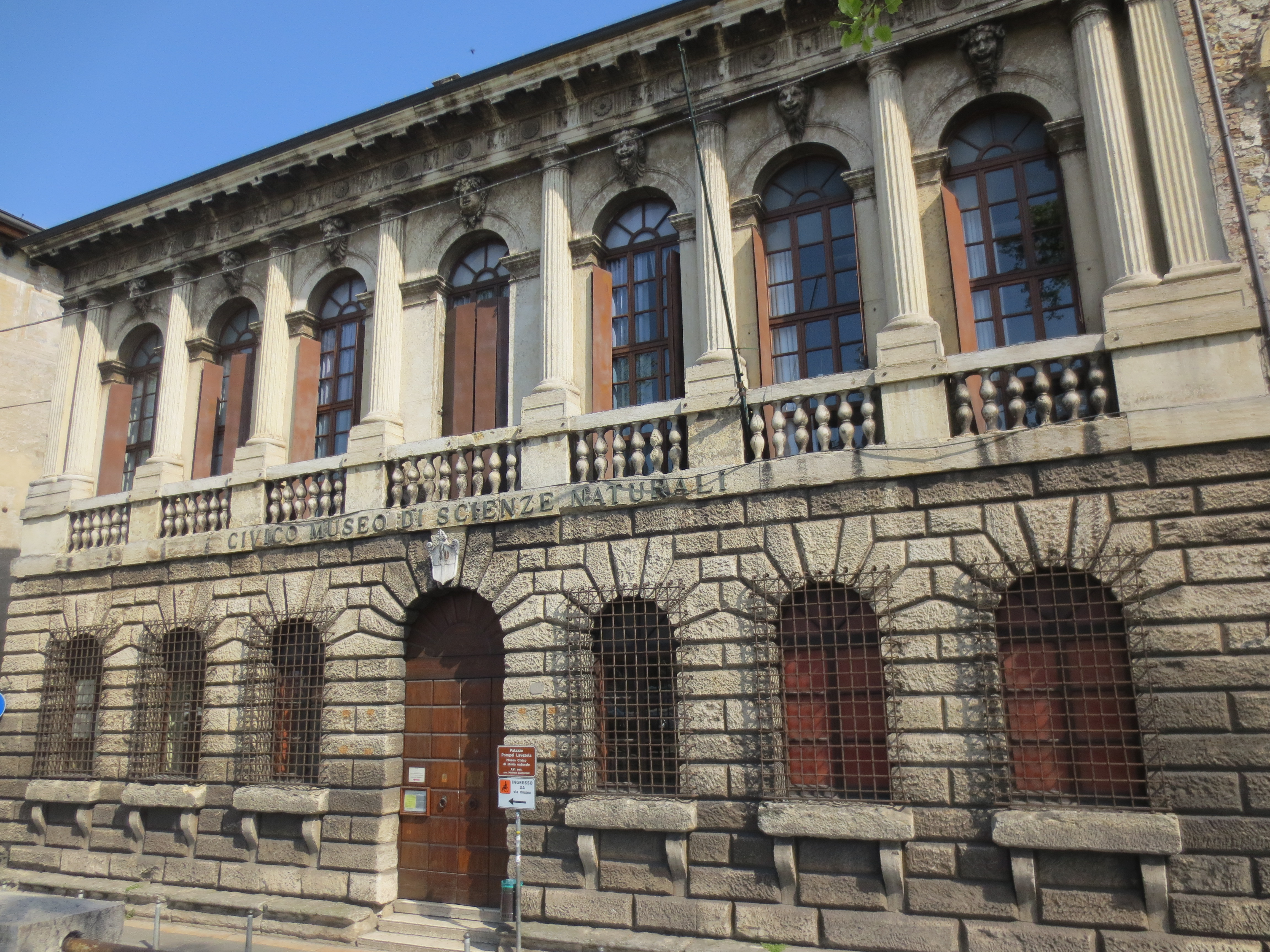 Facciata di palazzo Pompei Lavezola, sede del Museo di Storia Naturale di Verona